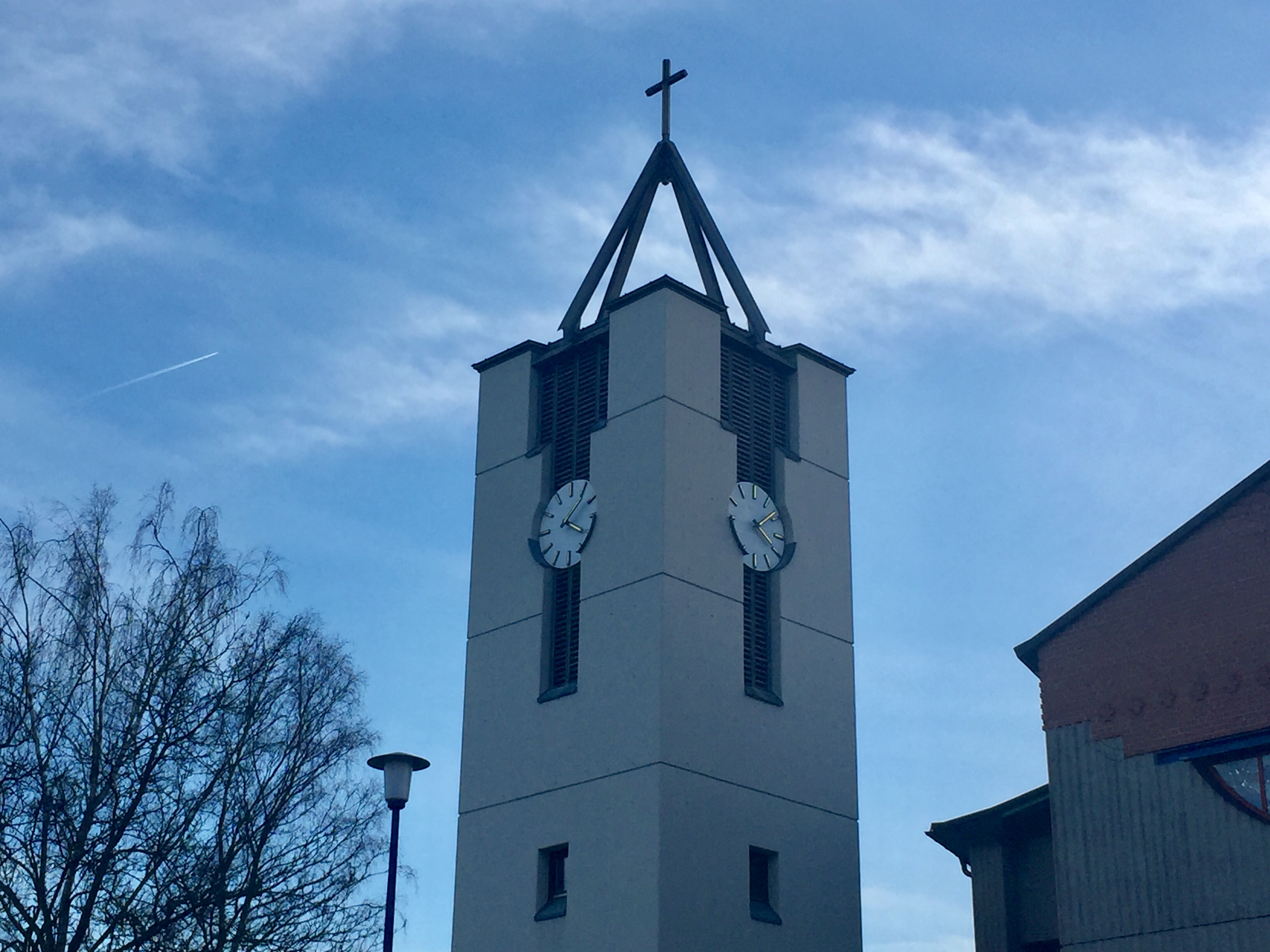 Freistehender Glockenturm